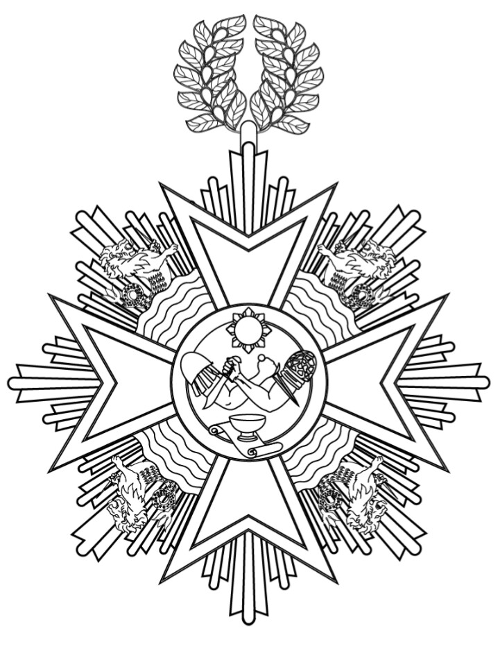 Order Sikatuny